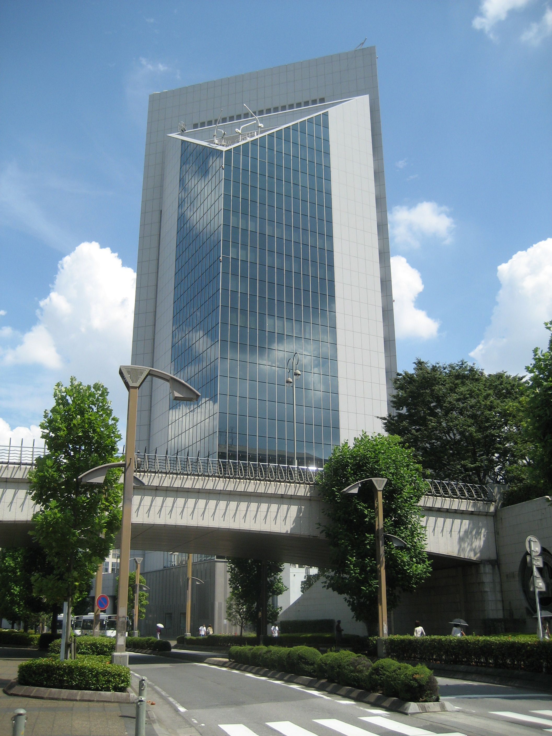 埼玉県川口市にある川口総合文化センター（リリア）（建物西側から撮影）